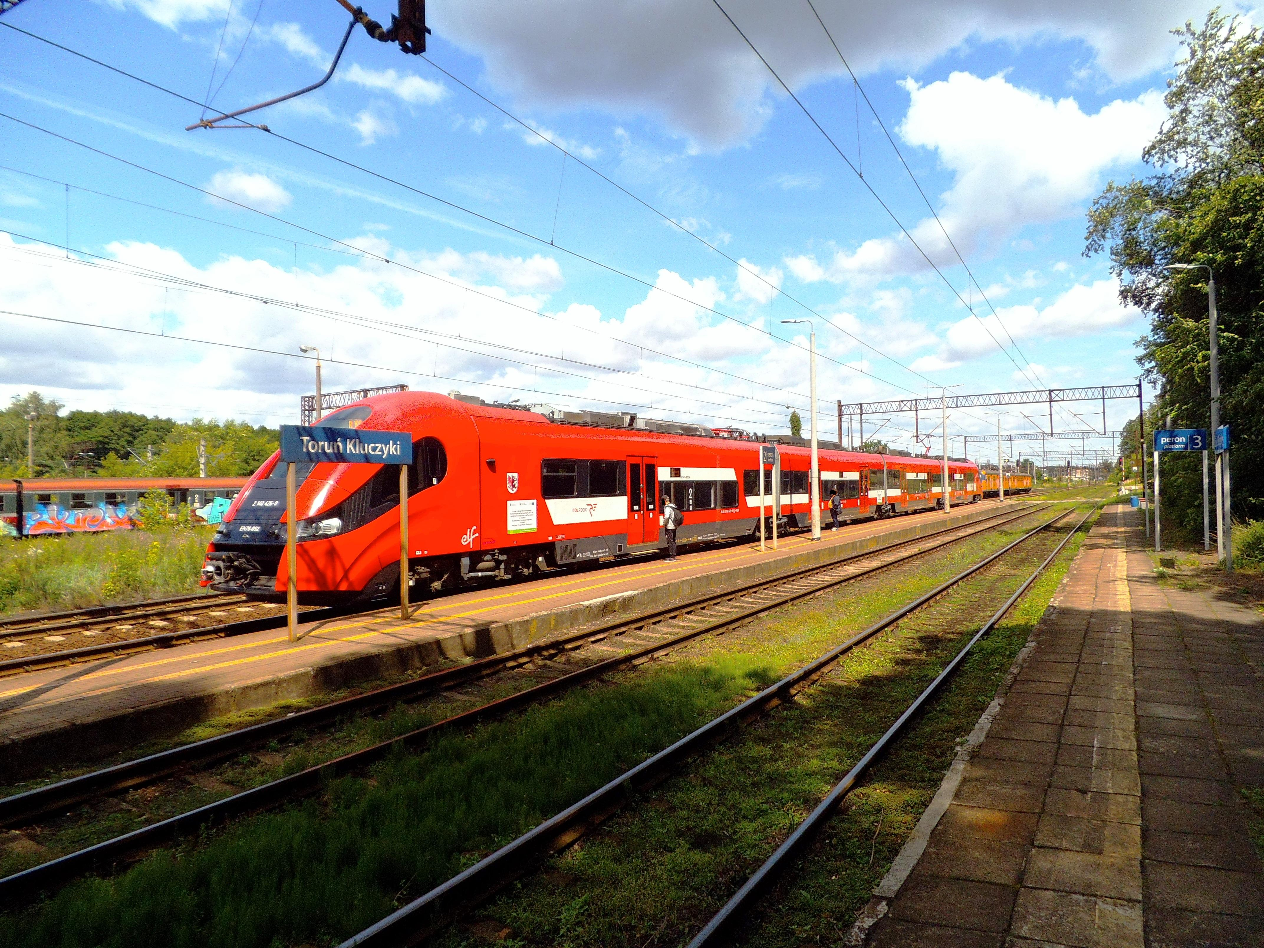 Toruń Kluczyki